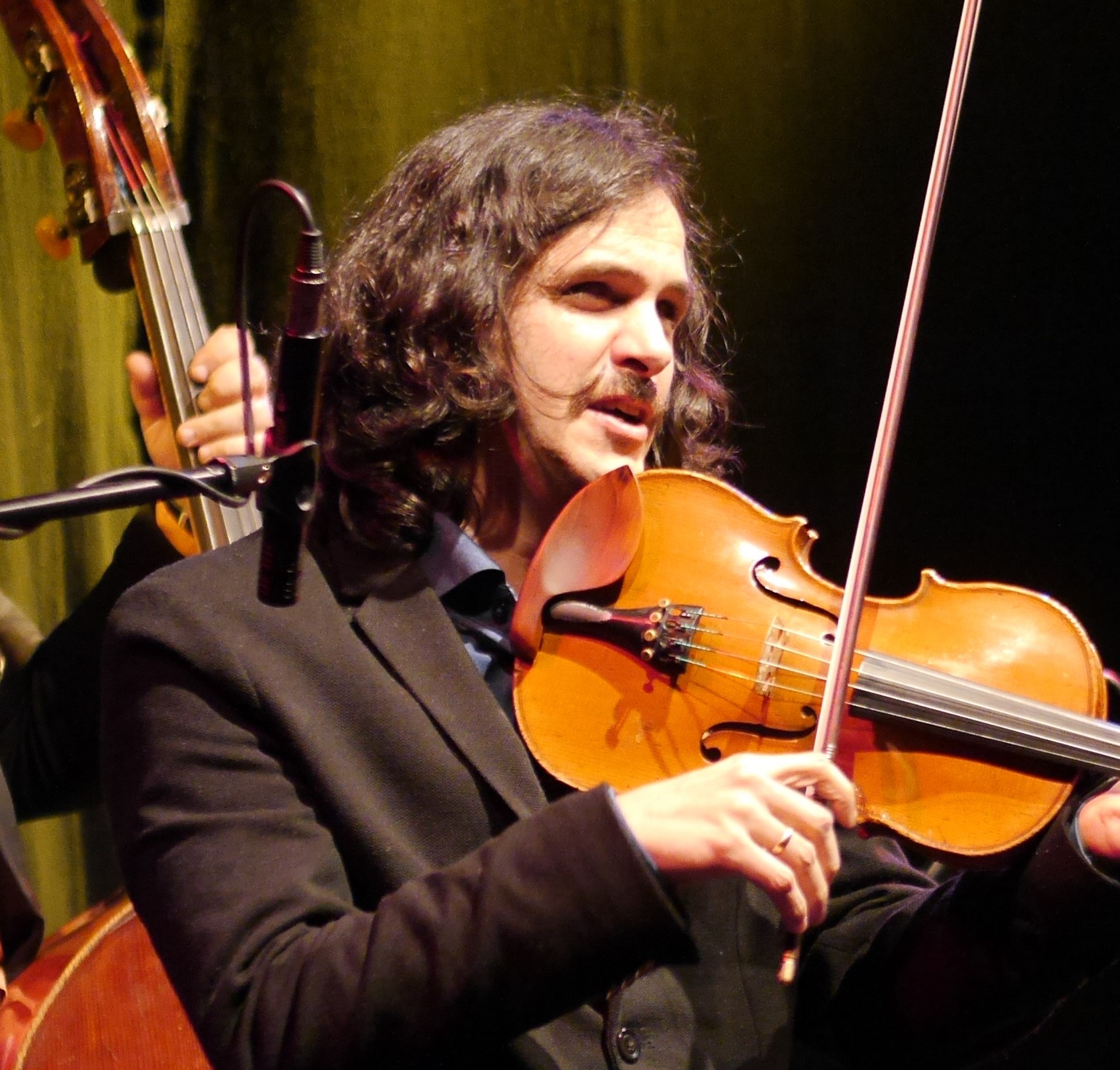 The Tcha Limberger Family Trio (Belgien/ Ungarn) beim Klangkosmos - Weltmusik in NRW in der Kulturfabrik Hangar 21, Detmold (Germany). Tcha Limberger – Geige, Gitarre, Gesang Benjamin Clement – Gitarre Vilmos Csikos – Kontrabass